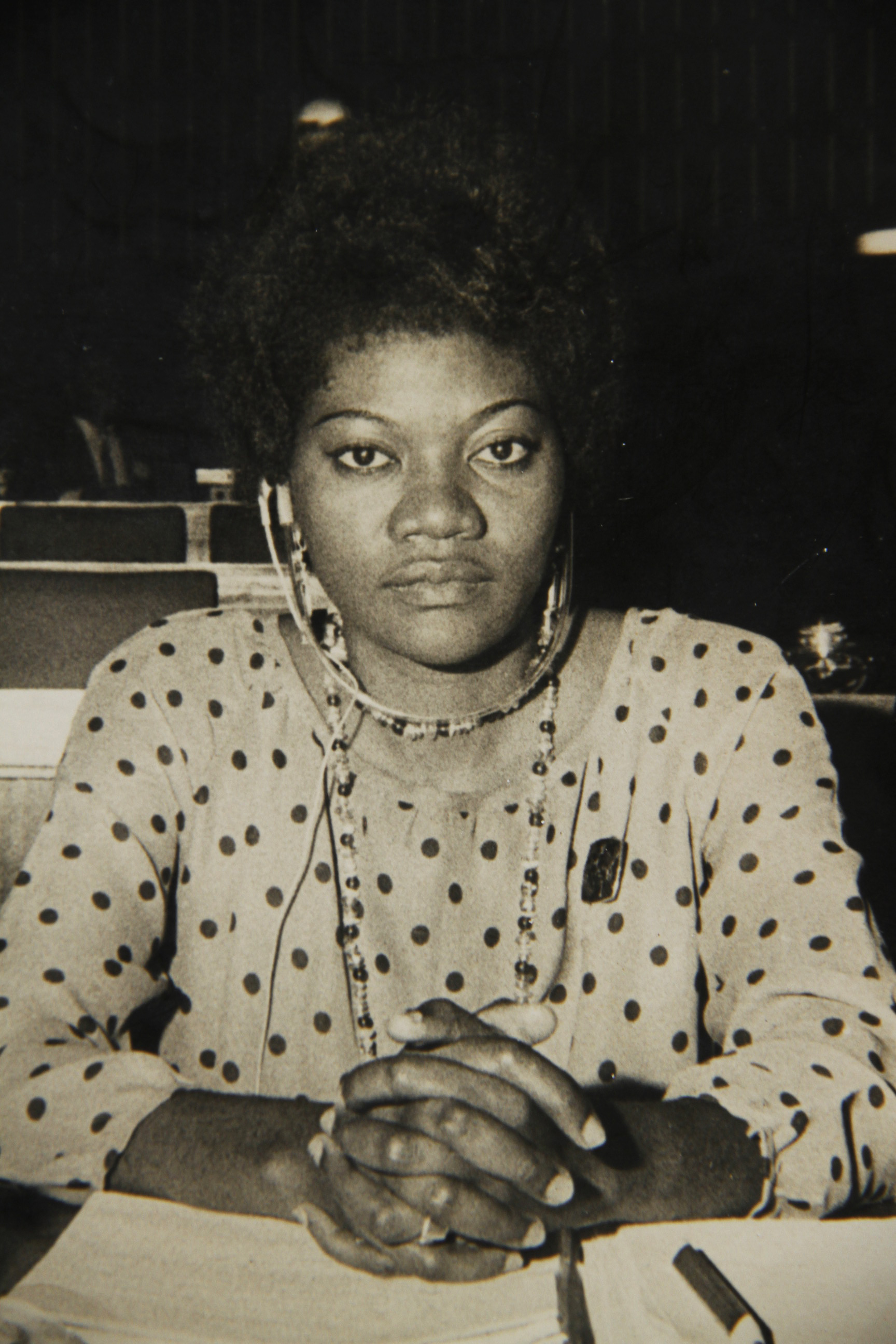 La ministre Delphine Tsanga à un sommet à Alger